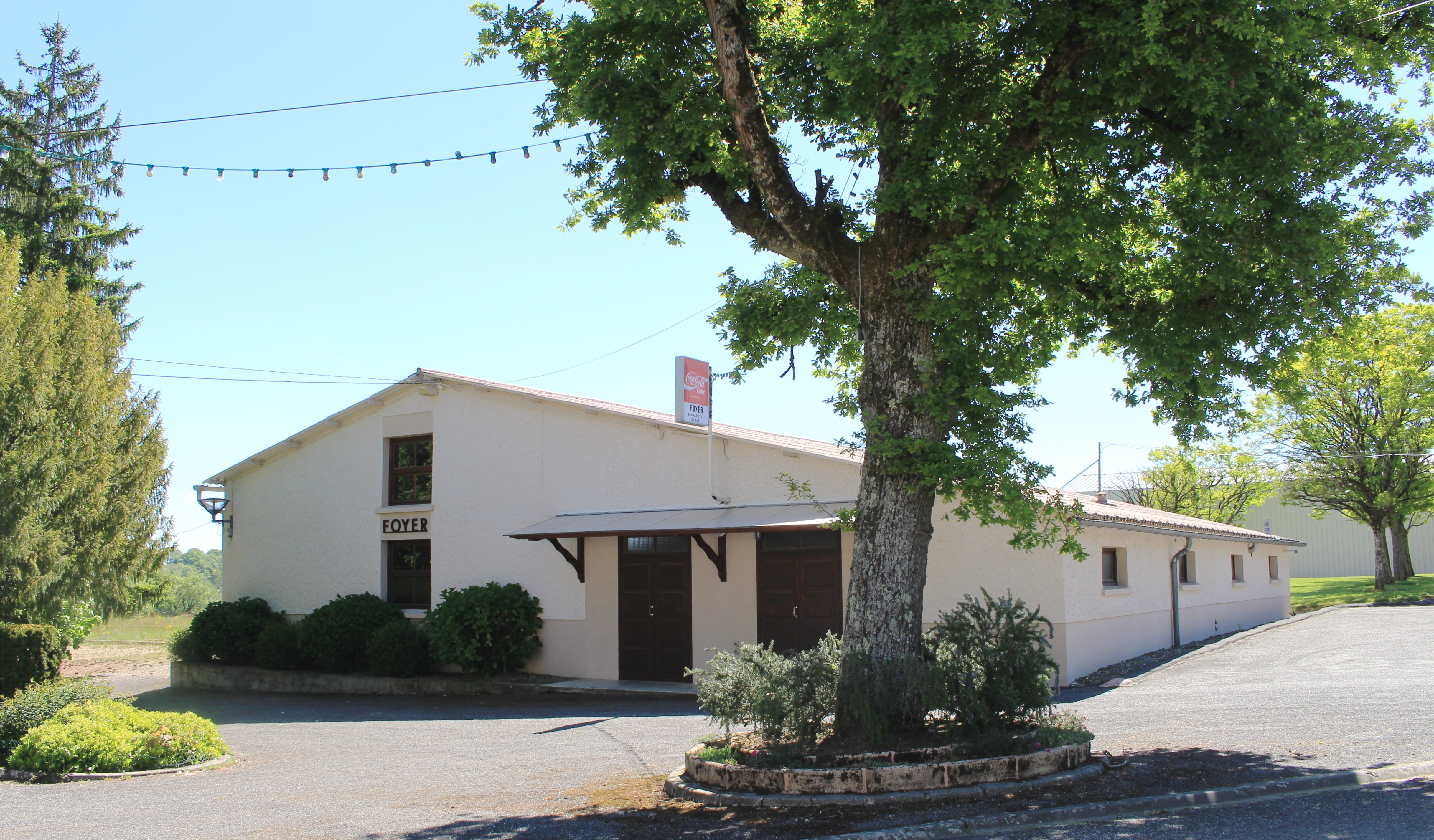 Foyer rural de Bernadets-Debat (Hautes-Pyrénées)